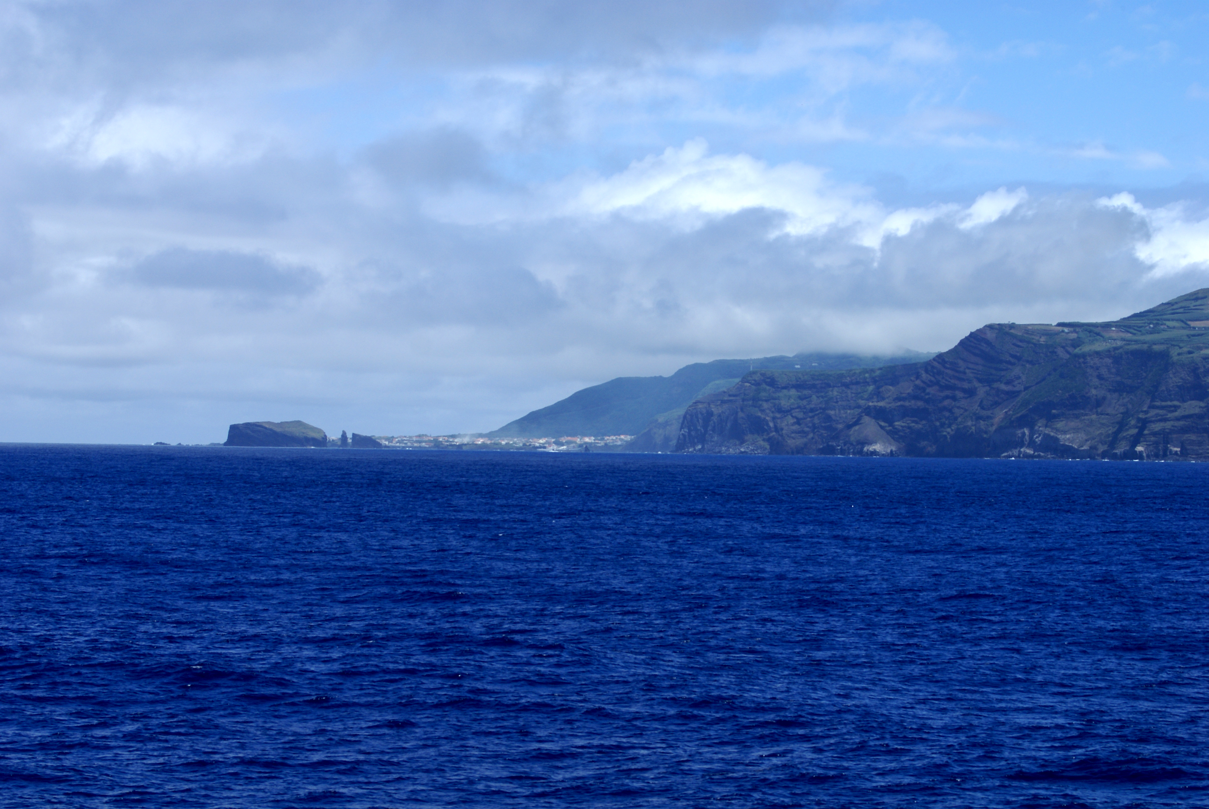 Mosteiro vistos do mar, Ponta Delgada, ilha de São Miguel, Açores